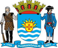 Brasão de Armas de Florianópolis conforme a Lei Municipal nº 1408